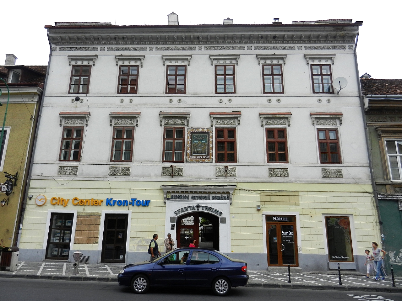 Casa Sextil Pușcariu